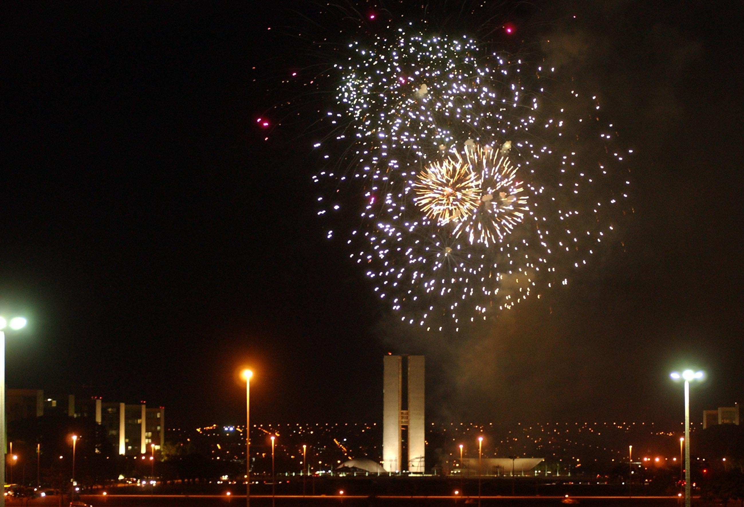 Queima de fogos de artifício em comemoração aos 100 anos da imigração japonesa no Brasil, na Esplanada dos Ministérios